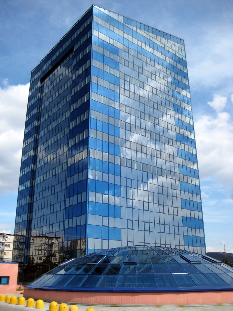 Tower centar u Rijeci, Hrvatska